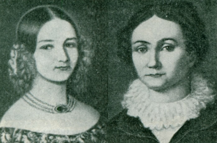 Портреты сёстер Азаревич